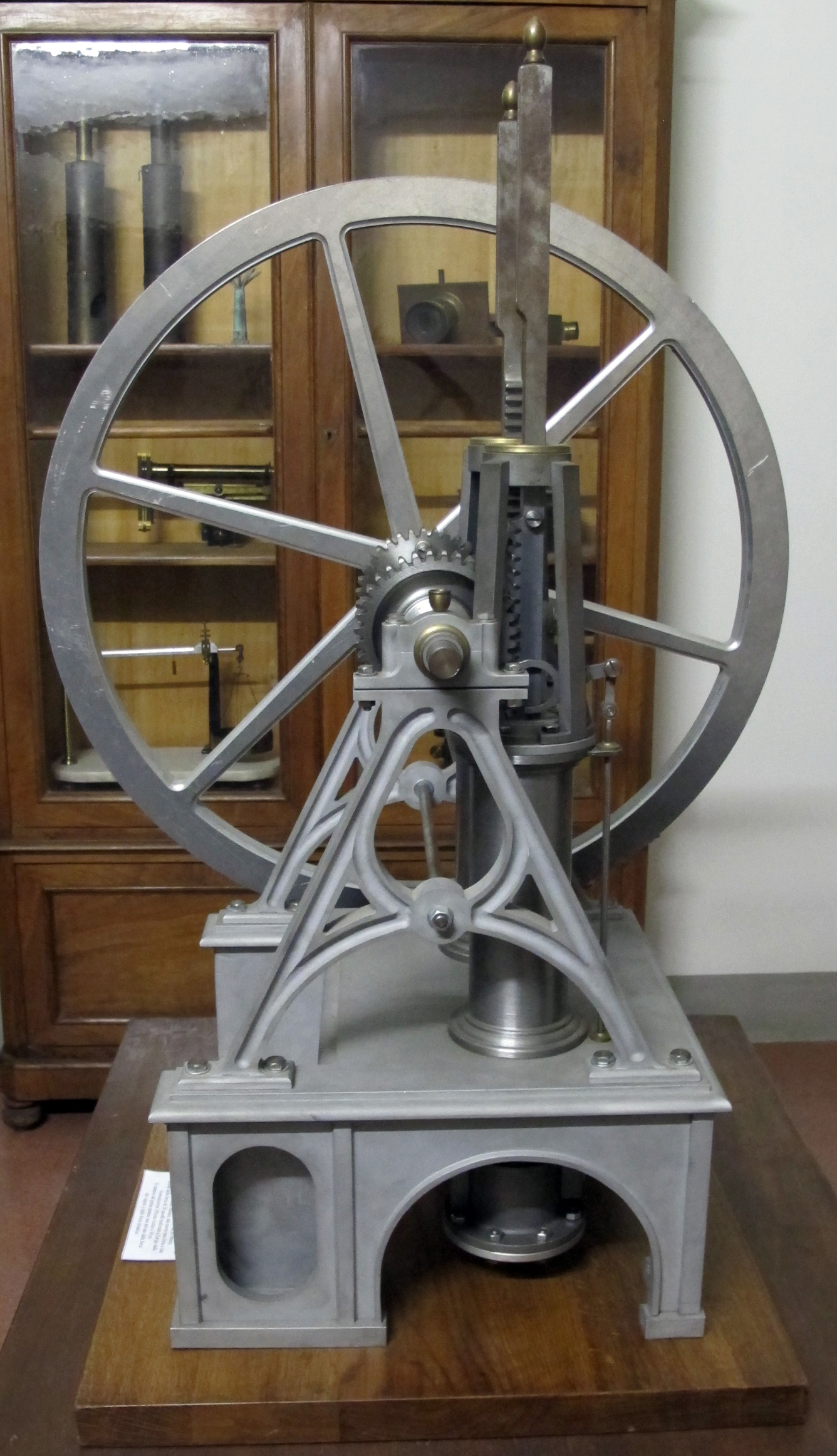 Osservatorio ximeniano, modello del motore a scoppio barsanti-matteucci